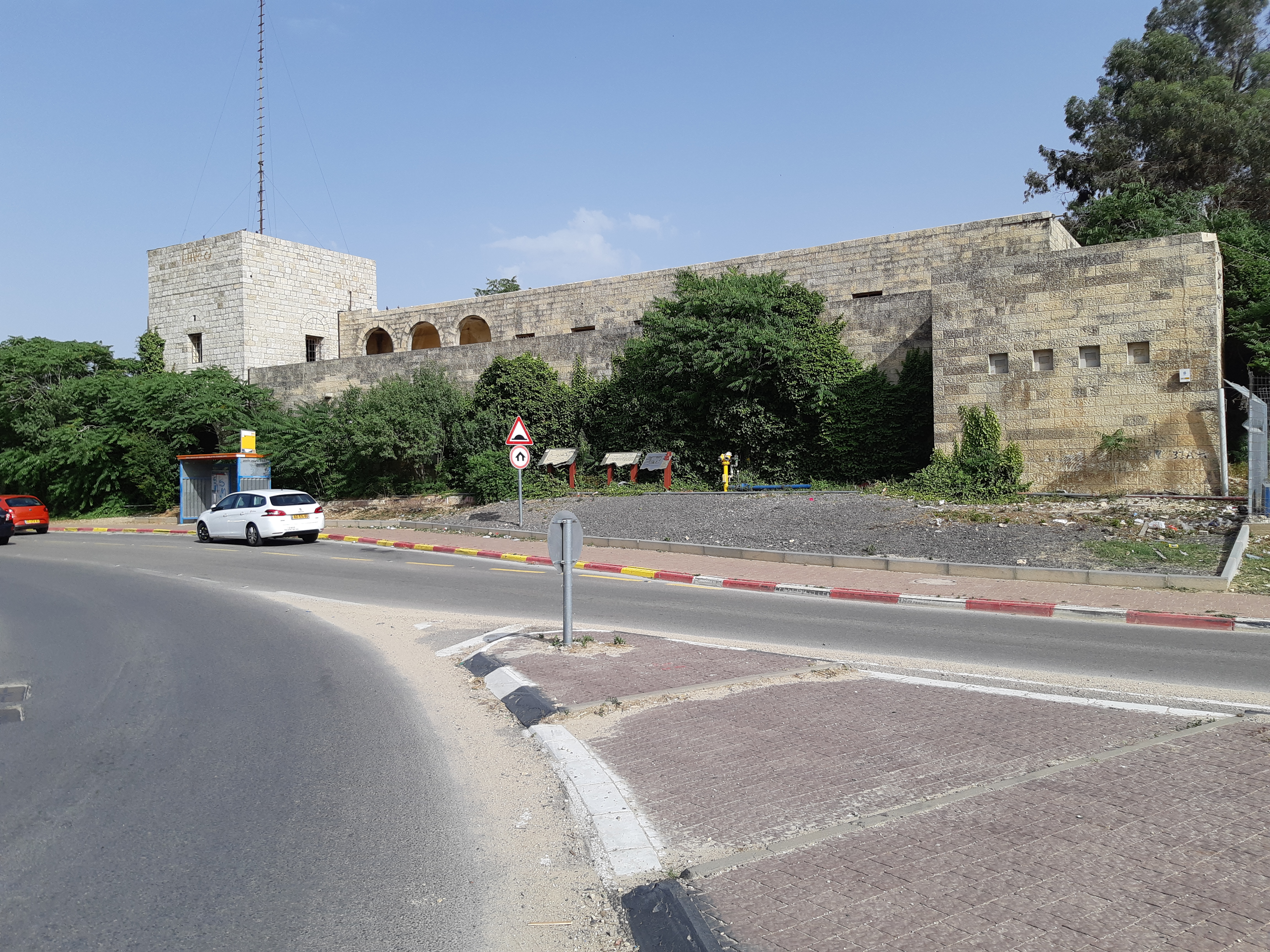 משטרת אבו גוש - מבט מבחוץ